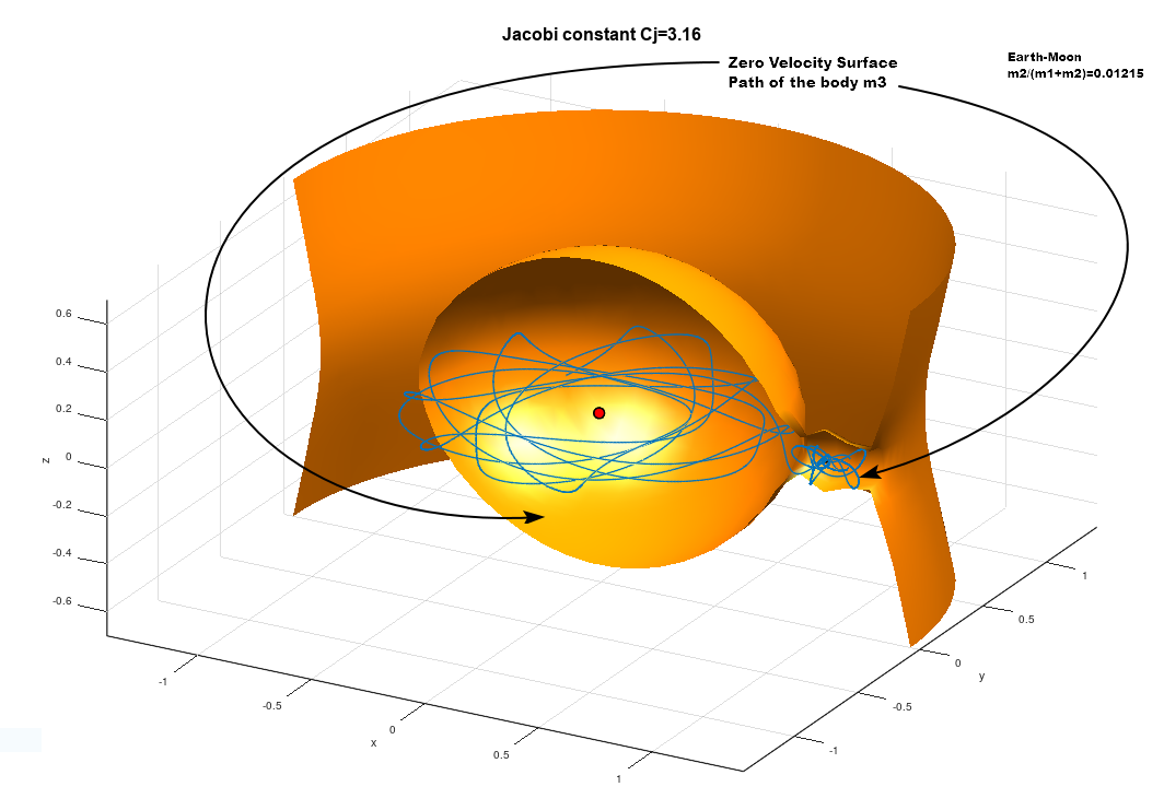 Jacobi constant 3D motion